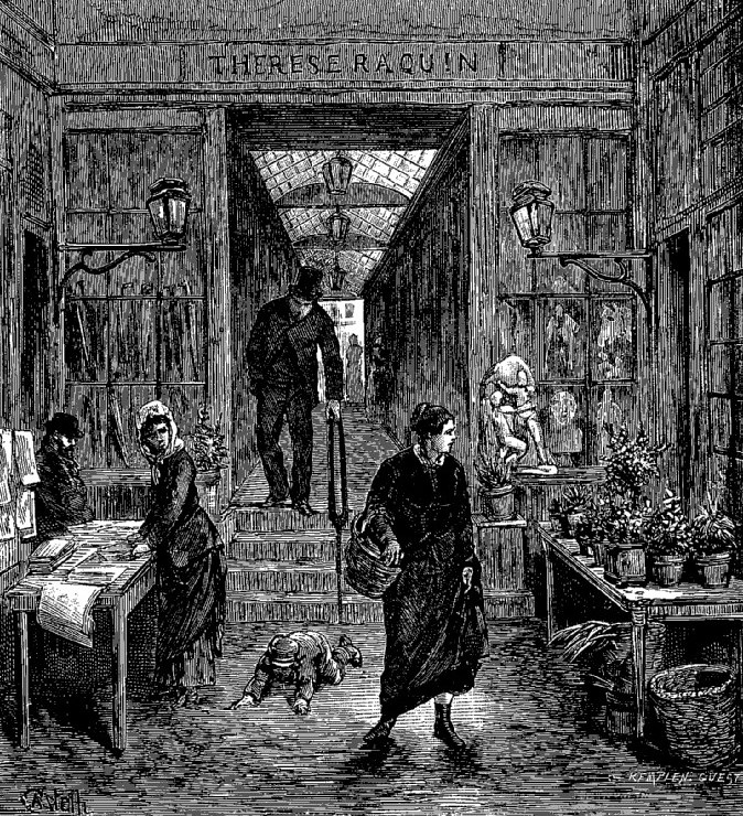 Le passage du Pont-Neuf.